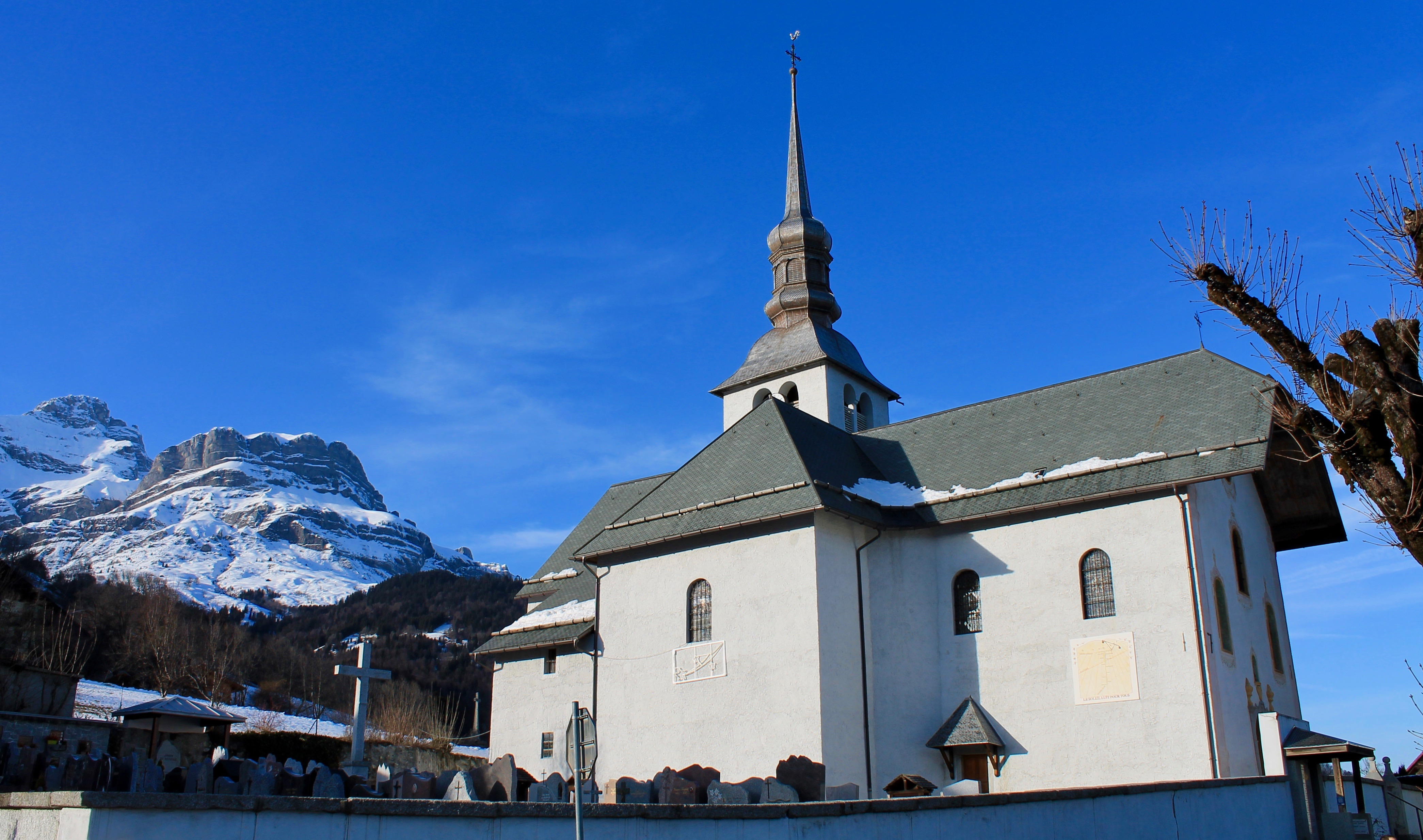 Pointe Percée, Quatre-Têtes depuis l'église Notre-Dame-de-l'Assomption de Cordon.